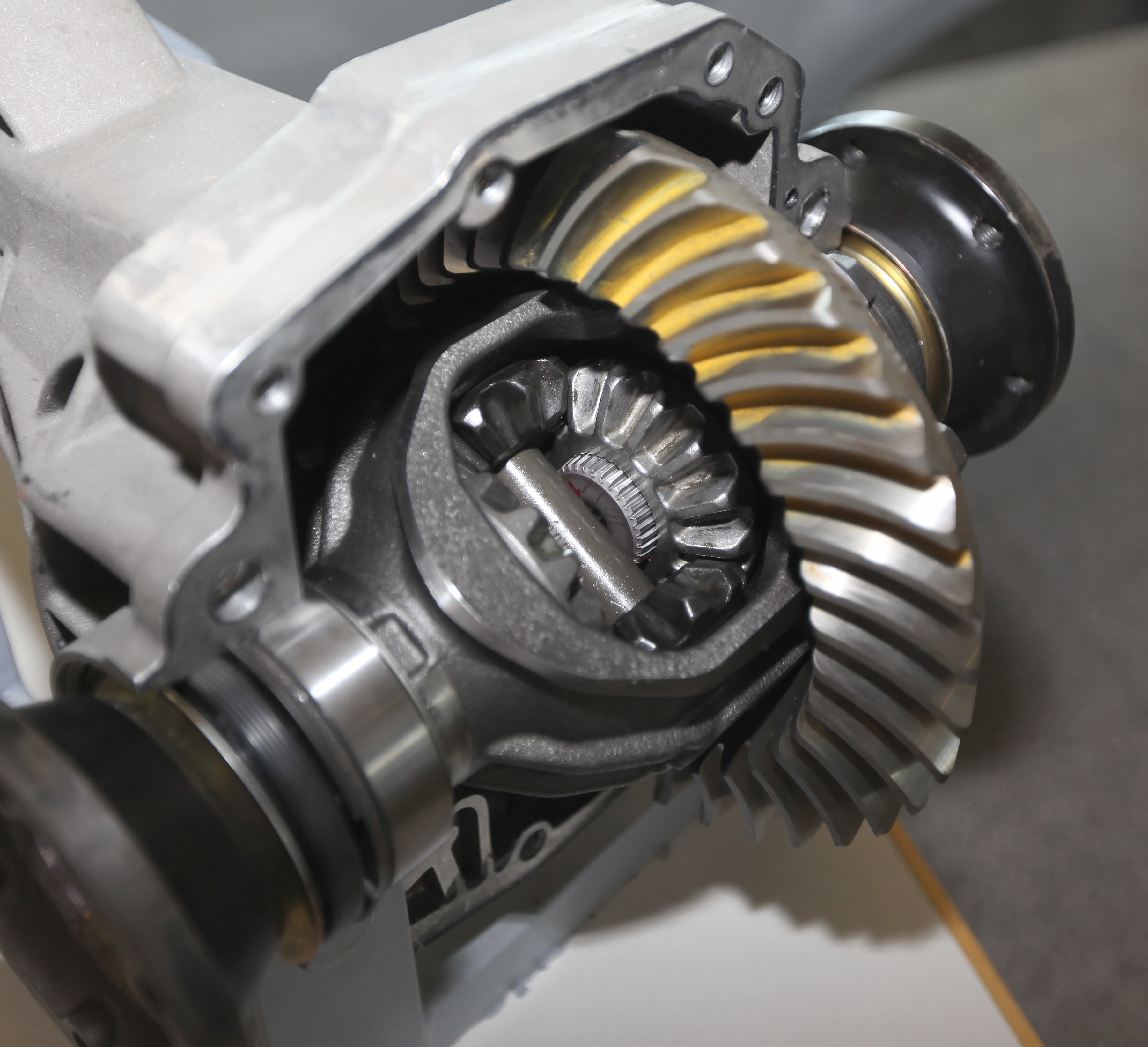 Differentialgetriebe der Hinterachse der VW Touareg/Porsche Cayenne Plattform.